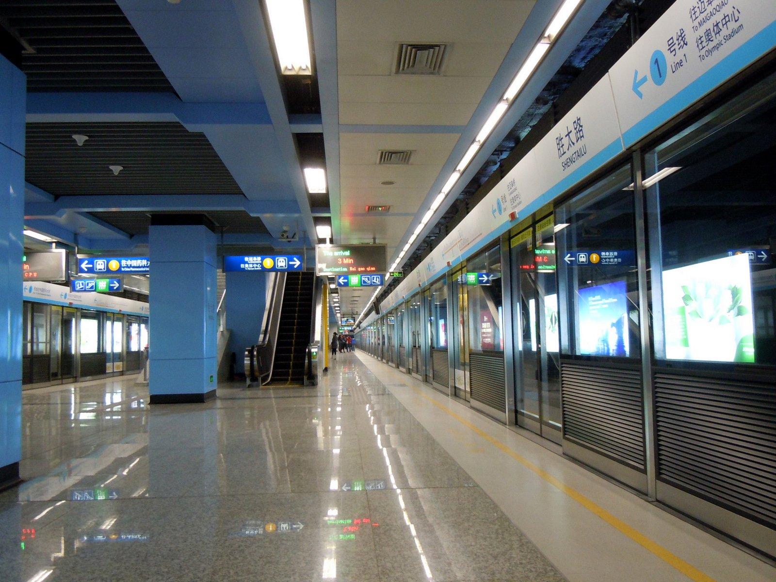 南京地铁胜太路站站台